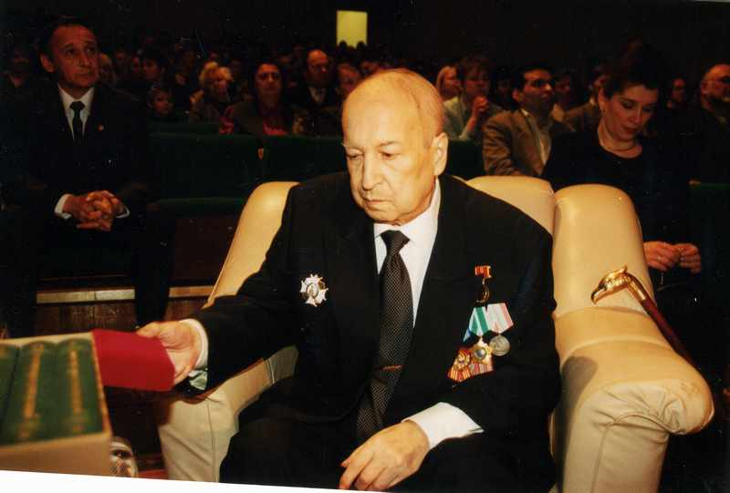 Альфред Карлович Айламазян, ректор Университета города Переславля, на празднике 10-летнего юбилея Университета города Переславля в культурном центре «Славич».